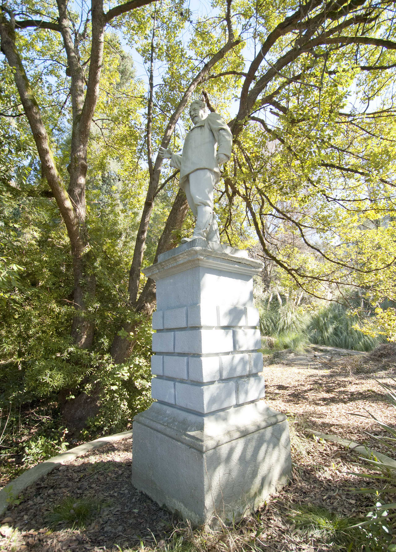 Здания санатория им. с. орджоникидзе. здесь в годы Великой Отечественной войны размещался госпиталь № 2132 (Краснодарский край, Сочи, курортный пр., 96, санаторий им. орджоникидзе)